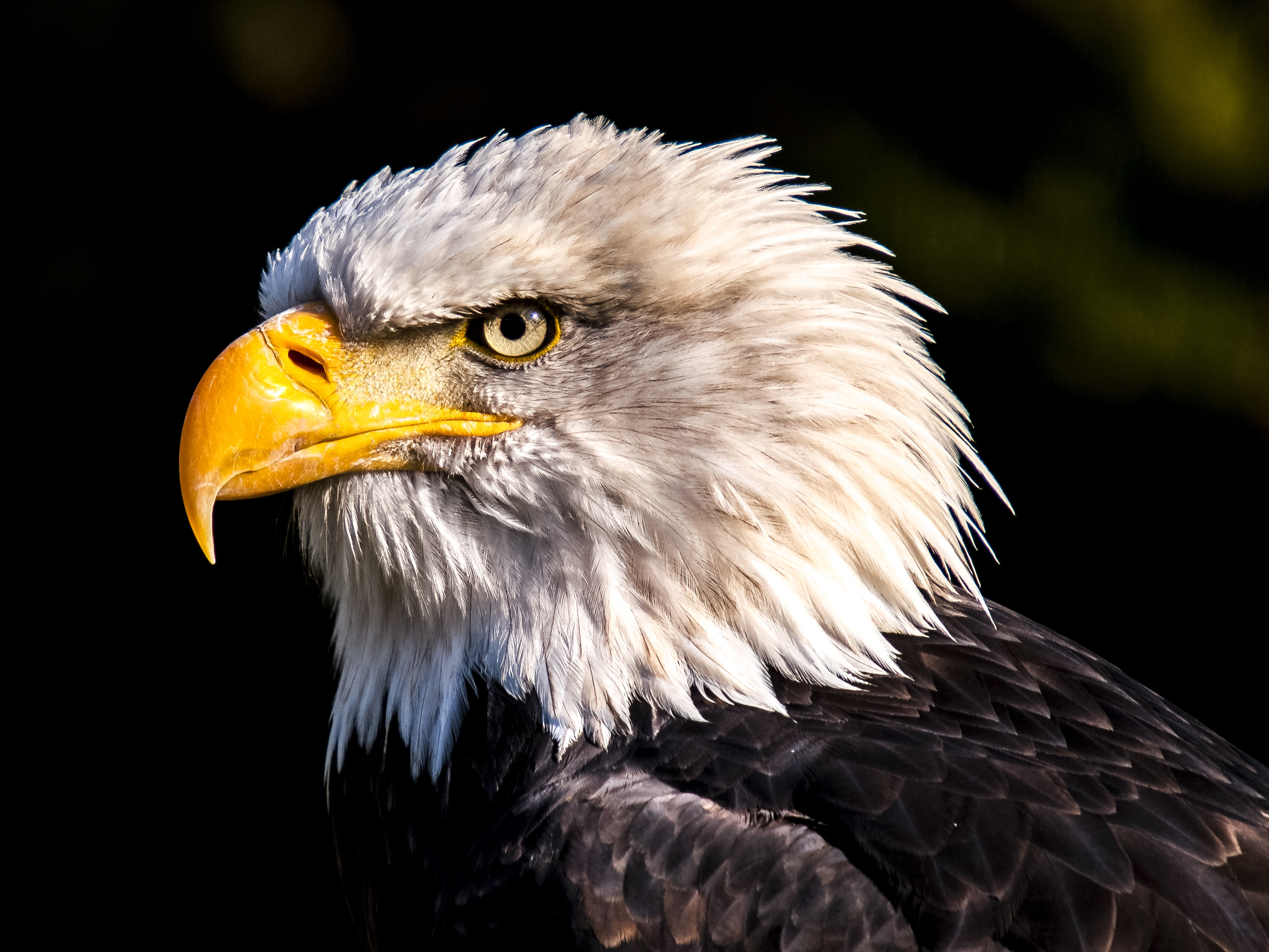 Une pygargue